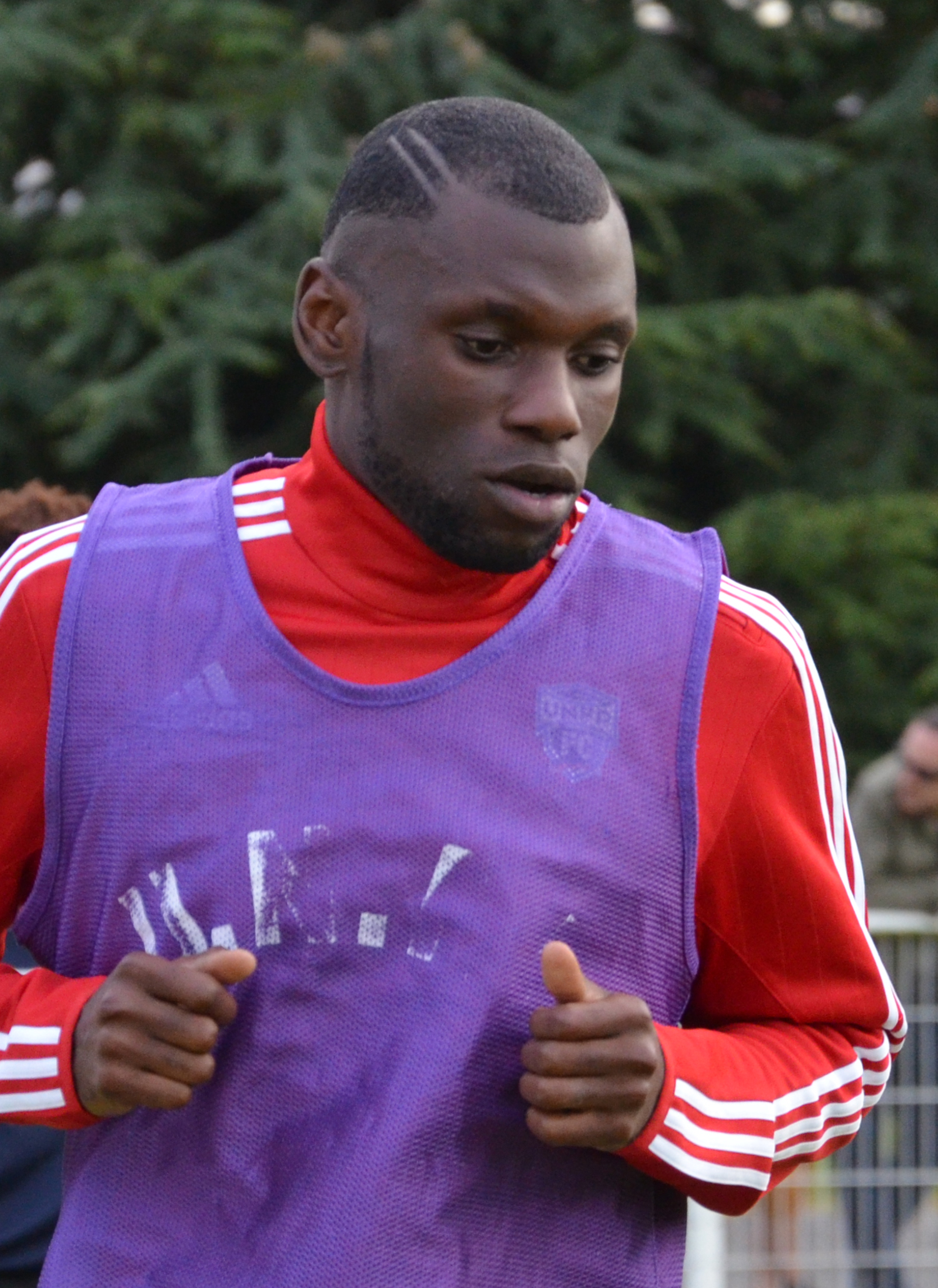 Photographie prise lors du match opposant le SM Caen à l'UNFP en match amical au stade Louis-Villemer de Saint-Lô le 30 juillet 2016. Ici, Lynel Kitambala.